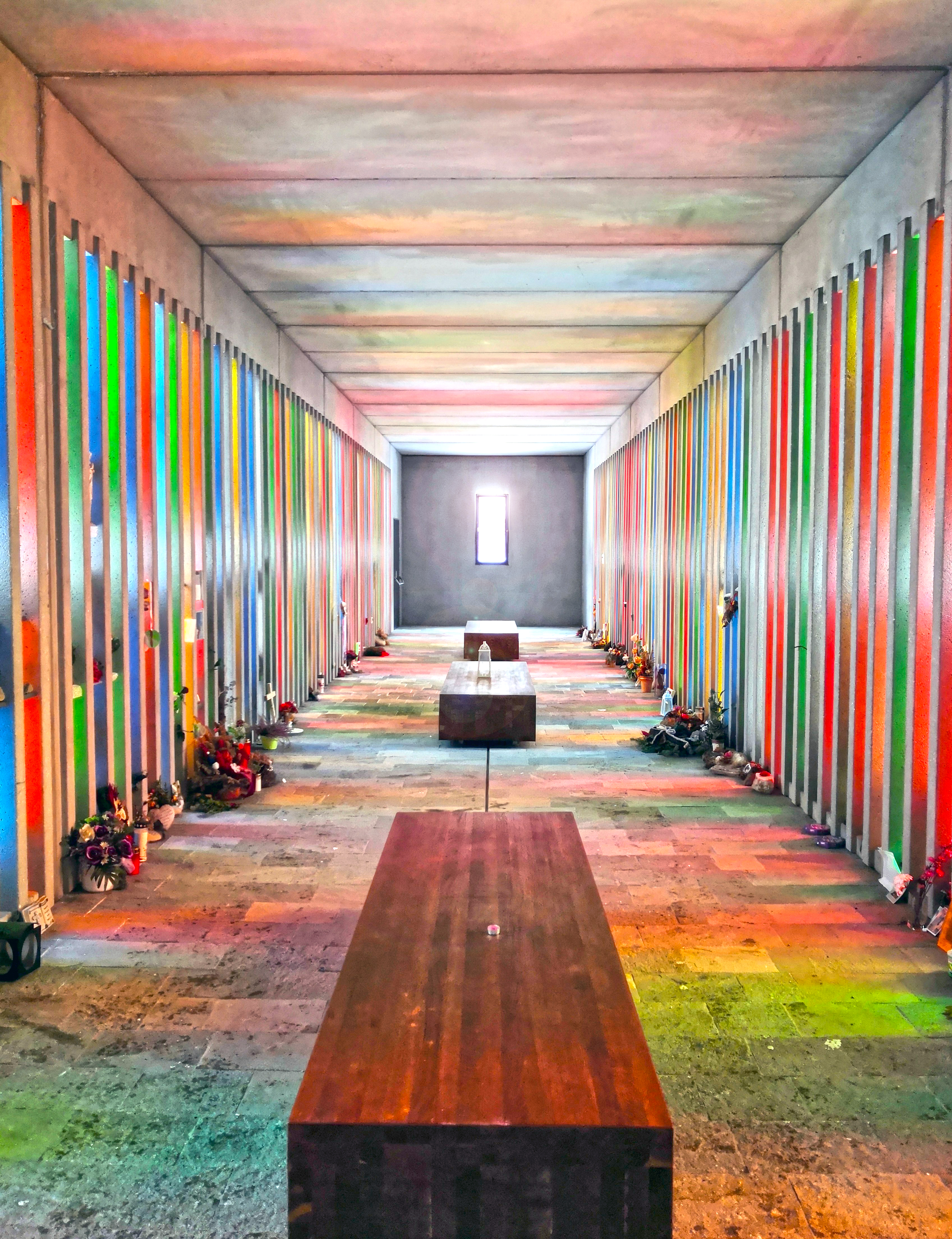 Inside the Kaprun Memorial; remembering the victims of the fire at the Kitzsteinhorn on November 11th, 2000